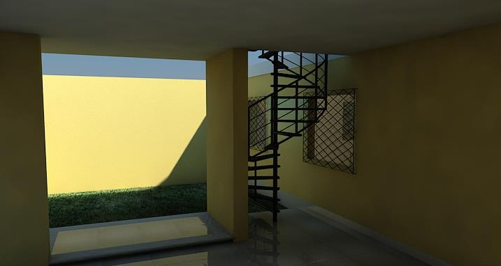 V-Ray Ejemplo Reflejos